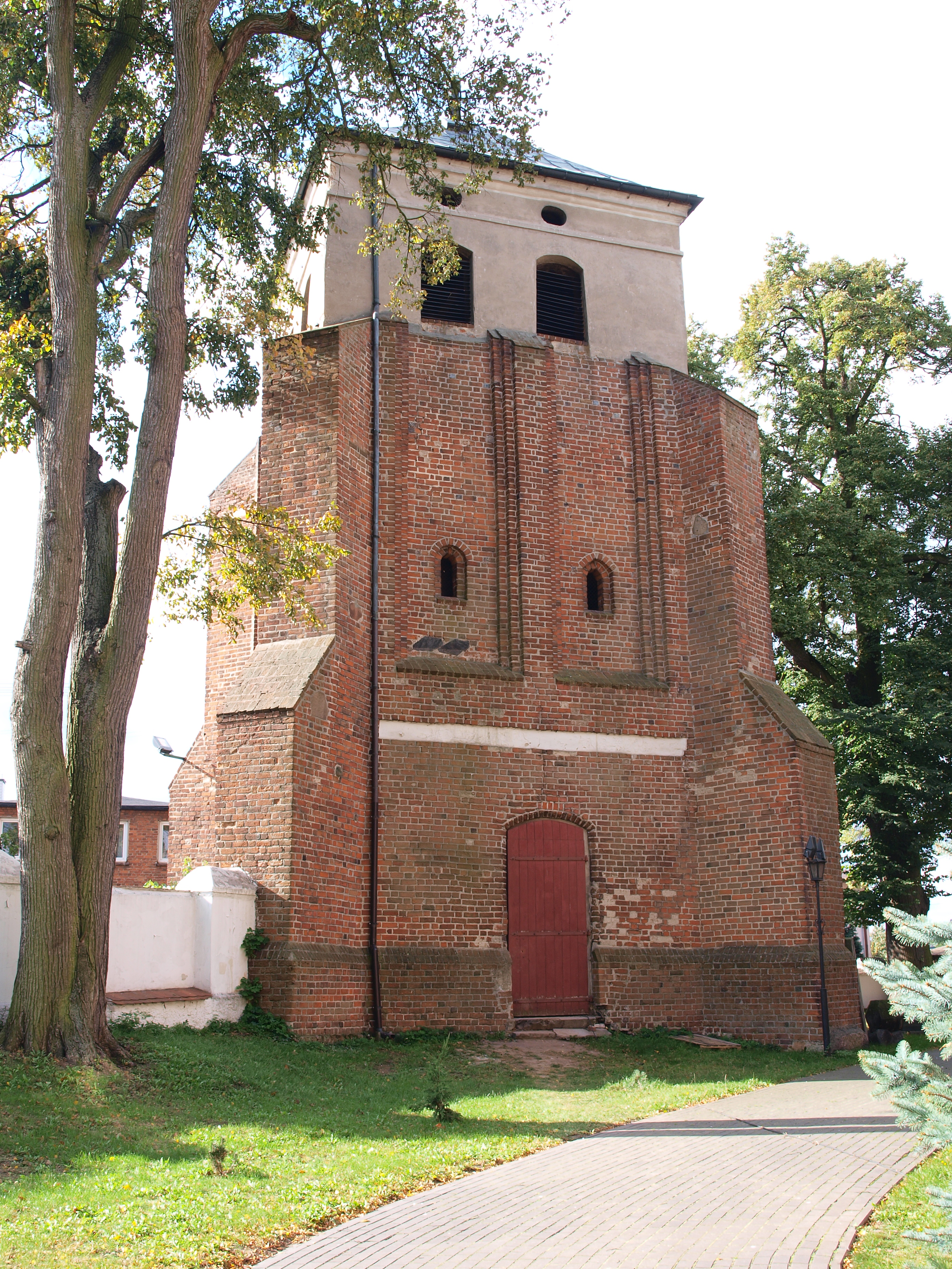 Dzwonnica, mur., XIV w. Widok z placu kościelnego (zabytek nr 851 z 28.12.1967)